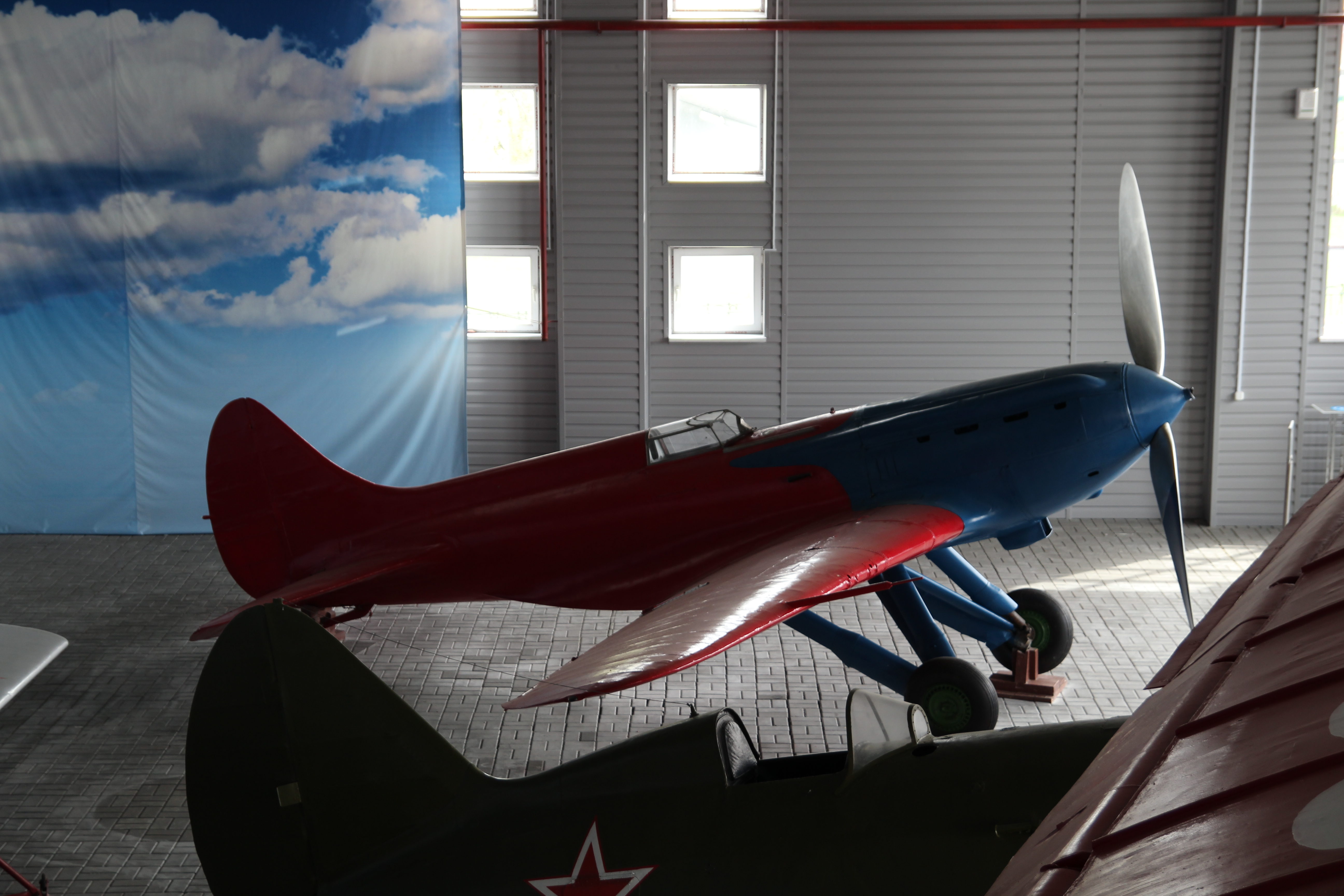 дом, в котором в 1904 г. родился летчик Чкалов В.П.; в доме - мемориальный музей В.П.Чкалова: улица Нагорная, 9; улица Чкалова, 5, Чкаловск, Чкаловский район, Нижегородская область